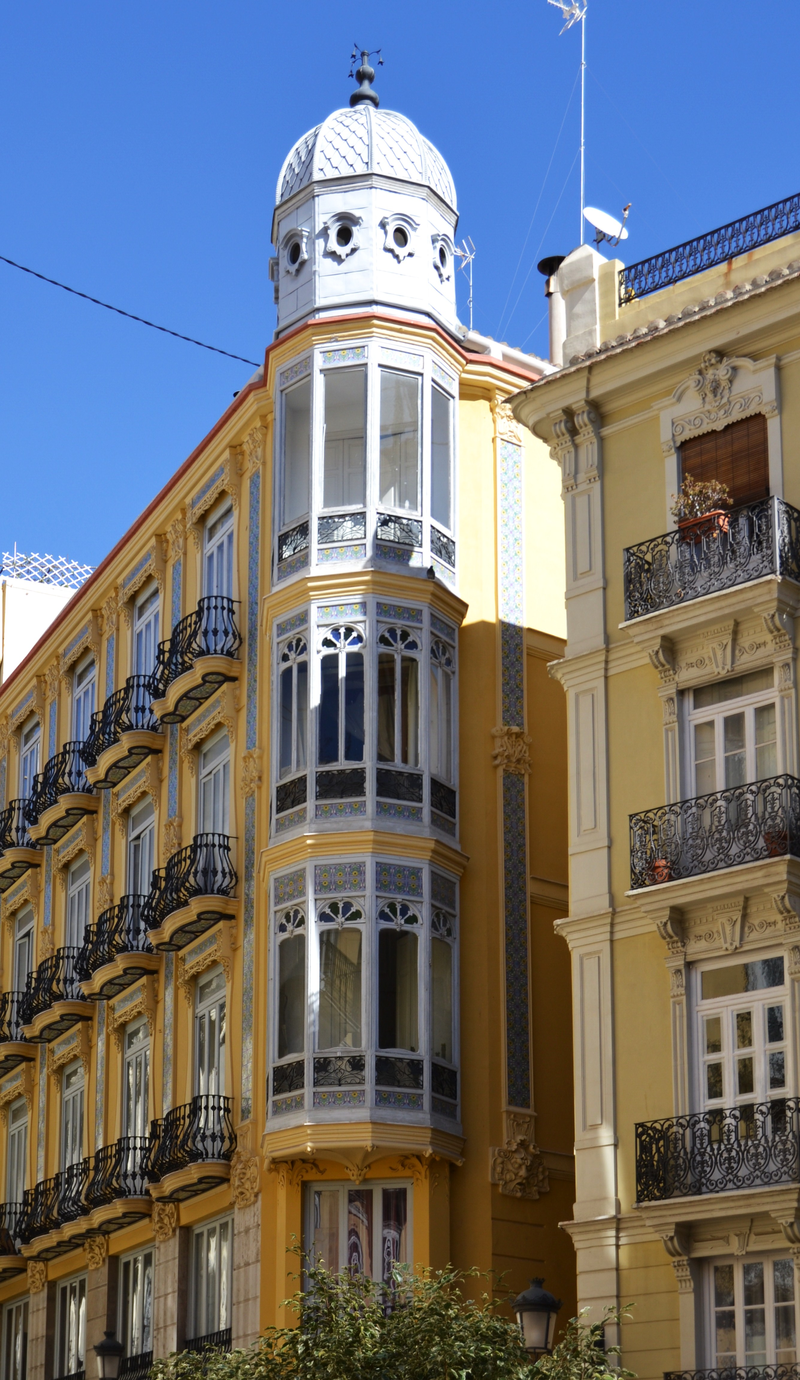 Edifici Aznar (València).